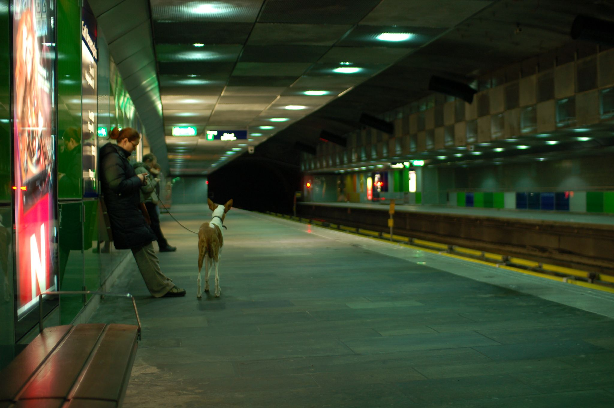 Carl Berners plass stasjon på T-banen i Oslo